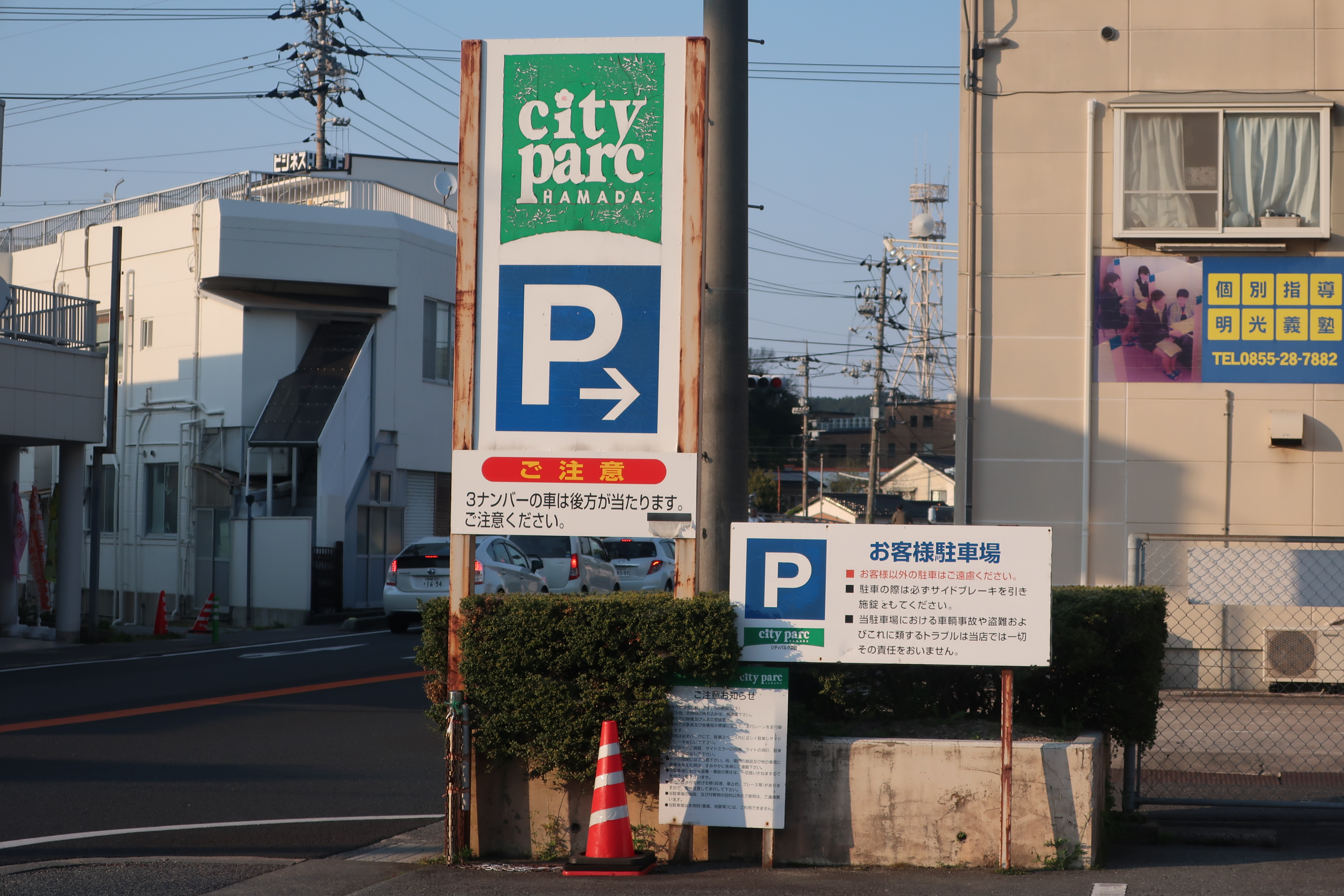 ゆめマート浜田の入り口にある看板。